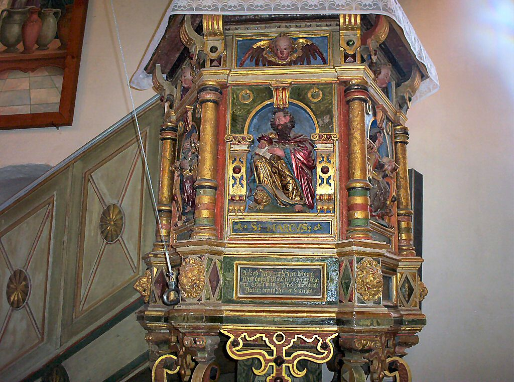 Kościół w Brzesku koło Pyrzyc - ambona